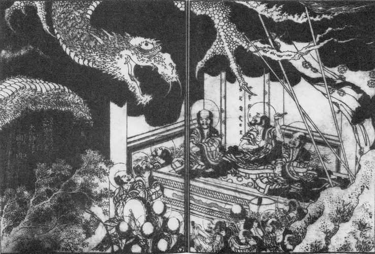 Dairokuten-Maaou (第六天魔王) from Shaka-goichidai-zue (釈迦御一代図会)